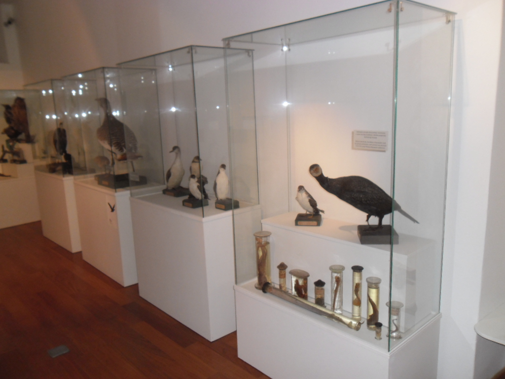 izlošci u dubrovačkom prirodoslovnom muzeju